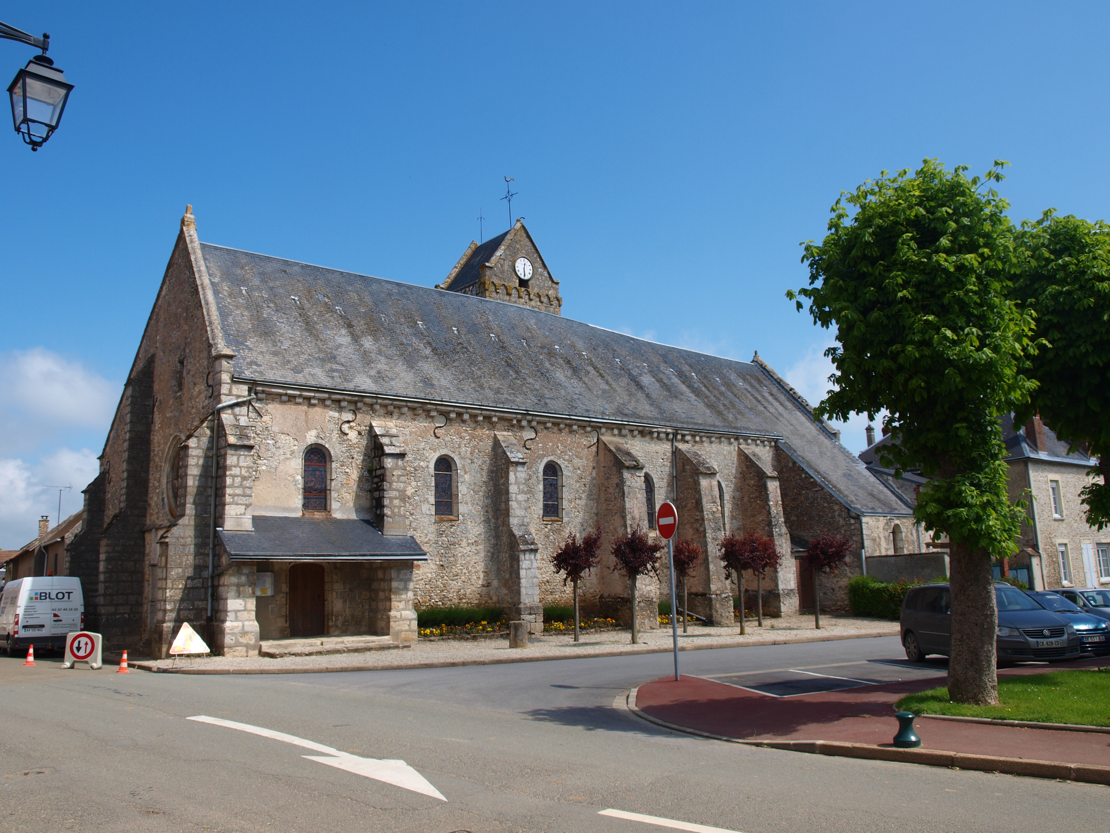 Sainville